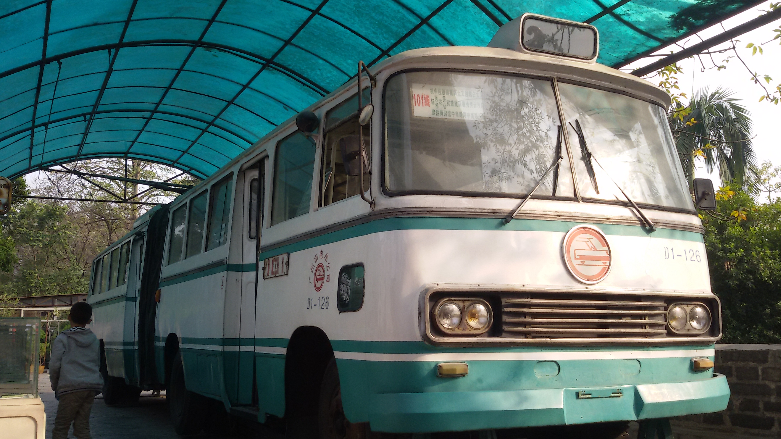 粵語: 通道型电车